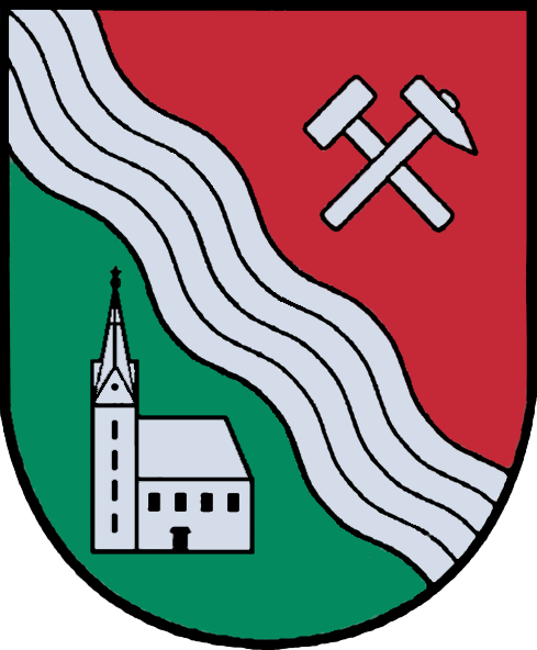 Die Wiederverleihung des Gemeindewappens erfolgte mit Wirkung vom 20. März 2016